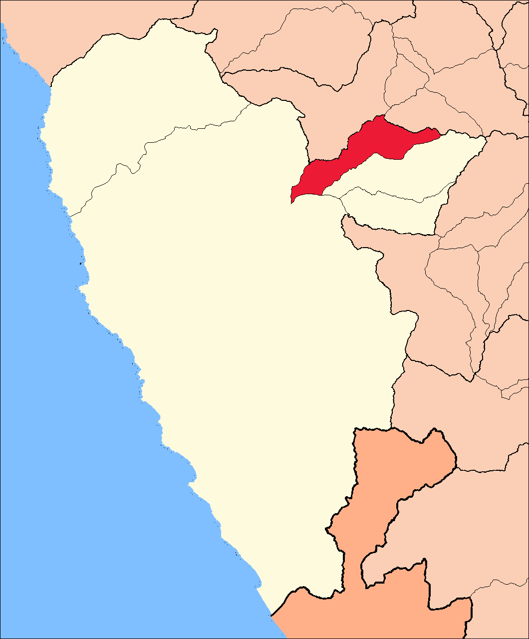 Ubicación del área del distrito de Huayan.